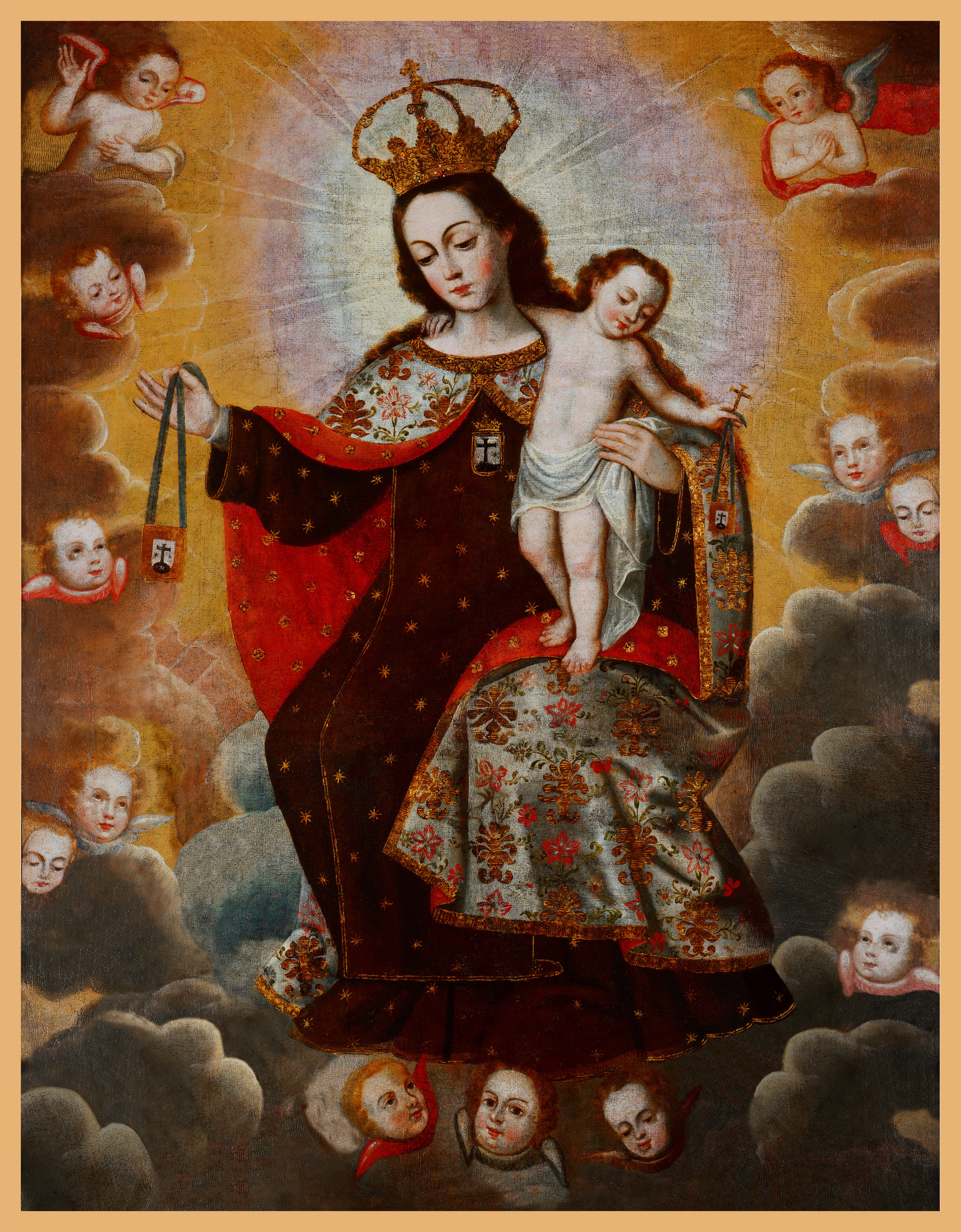 Santísima Virgen del Carmen Cuzqueña